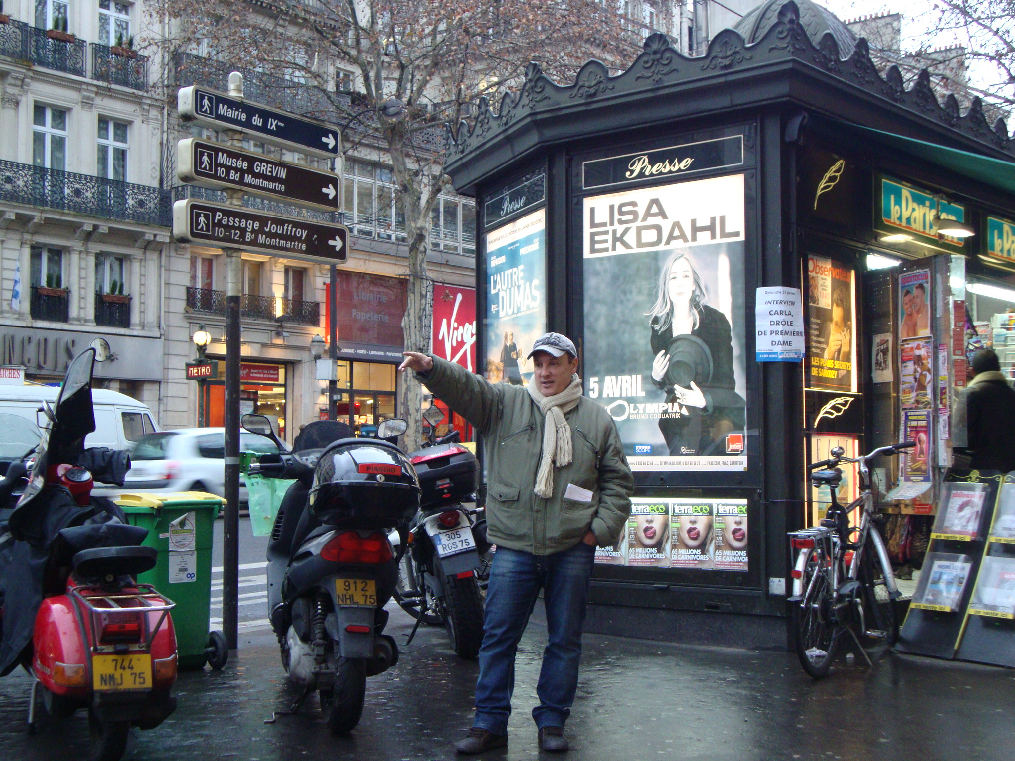 Gravando em Paris, 2010.